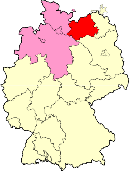 Localisation de la MFB au sein de la Norddeutscher Spiel Verband (NSV)